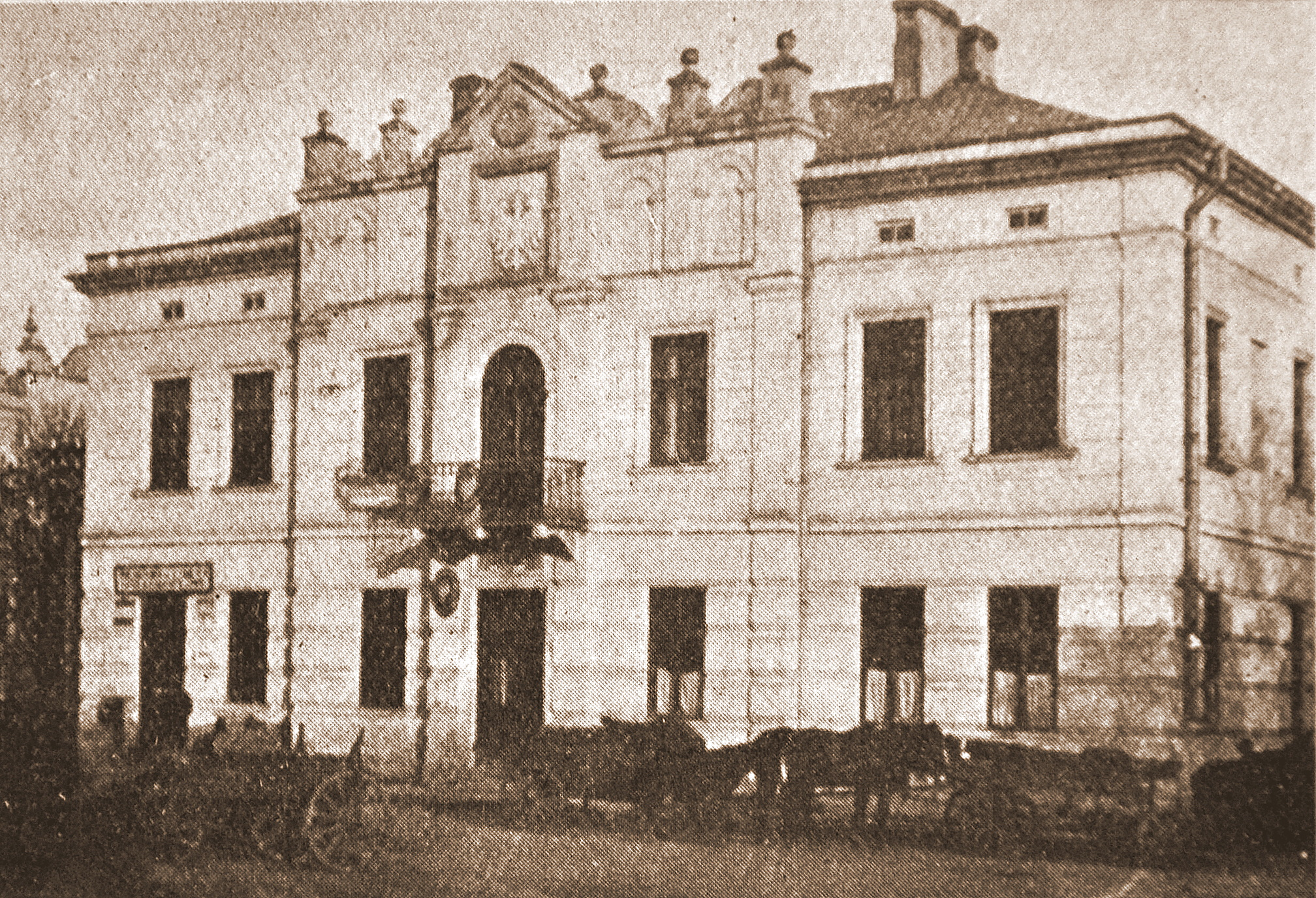 Oryginalny podpis pod zdjęciem: Gmach dowództwa 14 baonu KOP w Borszczowie